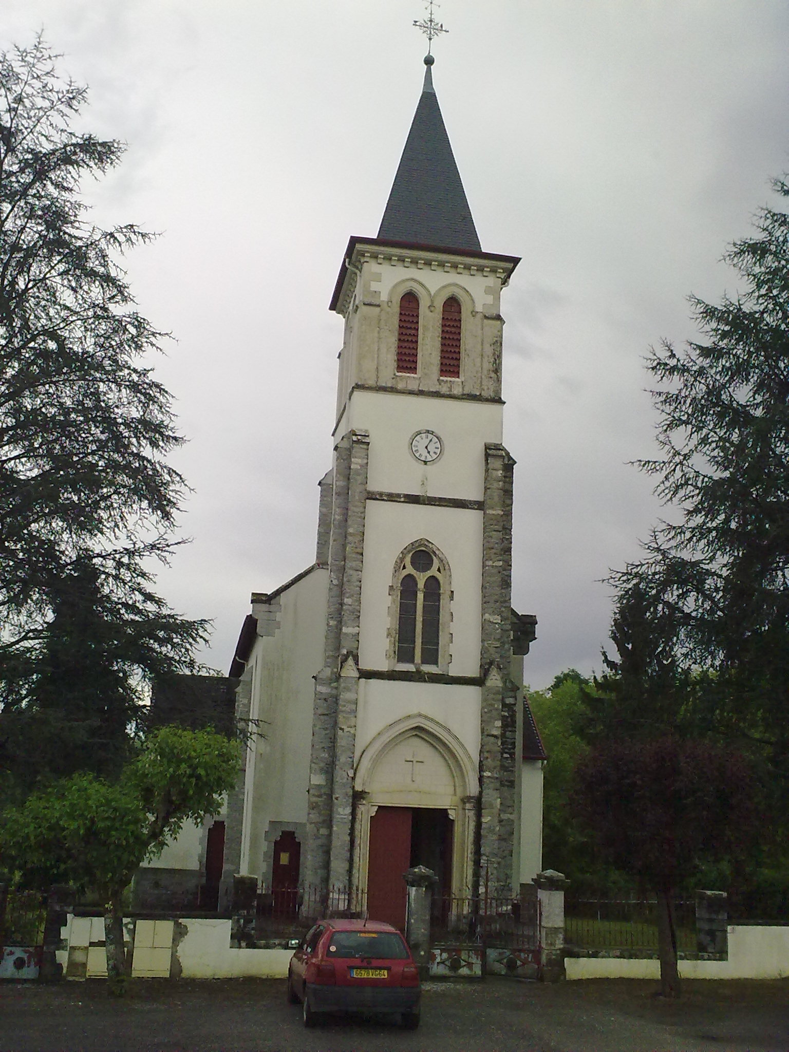 Uhart-Mixe, France